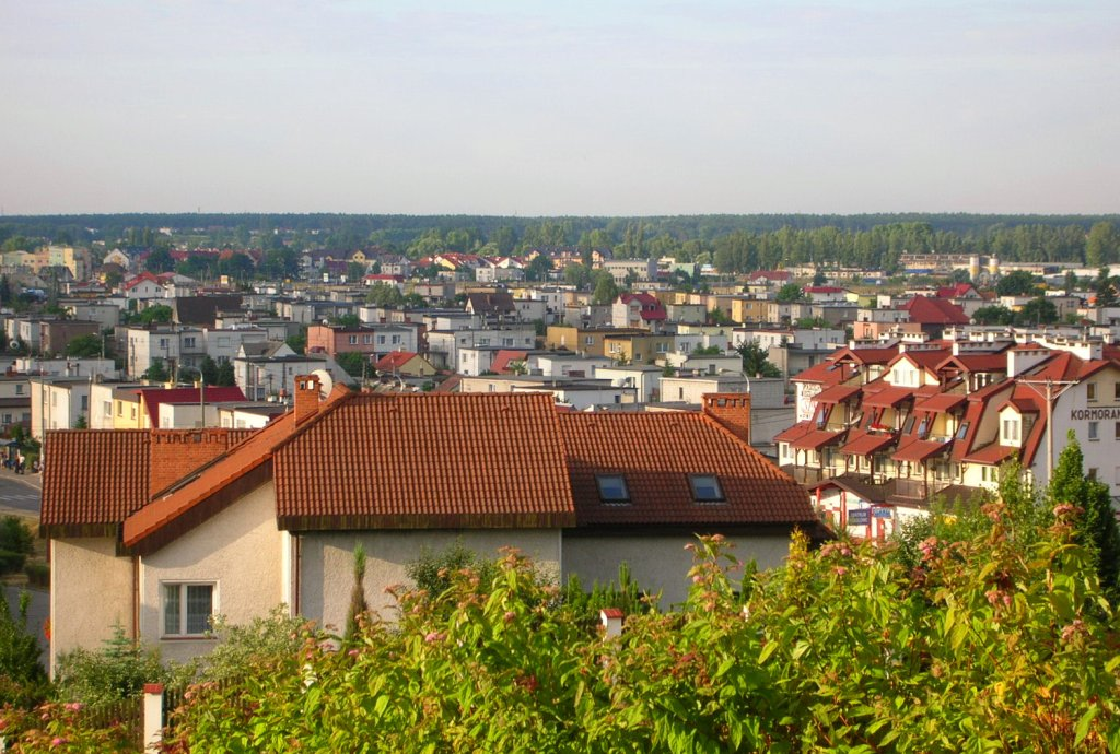 Osowa Góra w Bydgoszczy. Widok ze Zbocza Kruszyńskiego